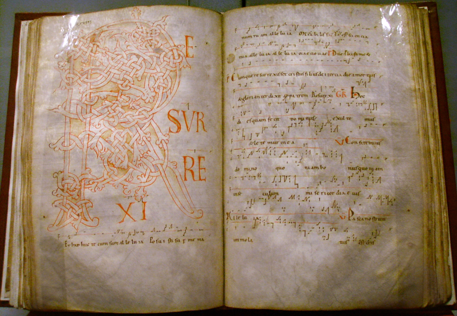 Modena, archivio capitolare, graduale ms.O.I.13, fine XI inizio XII sec.